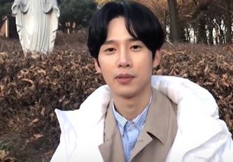 국민 드라마 반열에 오른 KBS 2TV 주말 드라마 '하나뿐인 내편'이 어제(3월 17일) 종영되었습니다. 우리의 주말을 책임지던 달달 장인 고래 쌤의 굿바이 인사를 영상으로 만나보세요! 하나뿐인내편 #장고래 #박성훈 더 많은 영상을 보고 싶다면 구독! 다른 SNS도 놀러오세요 ▷BH Ent 네이버 포스트 : ▶BH Ent 인스타그램 : ▷BH Ent 페이스북